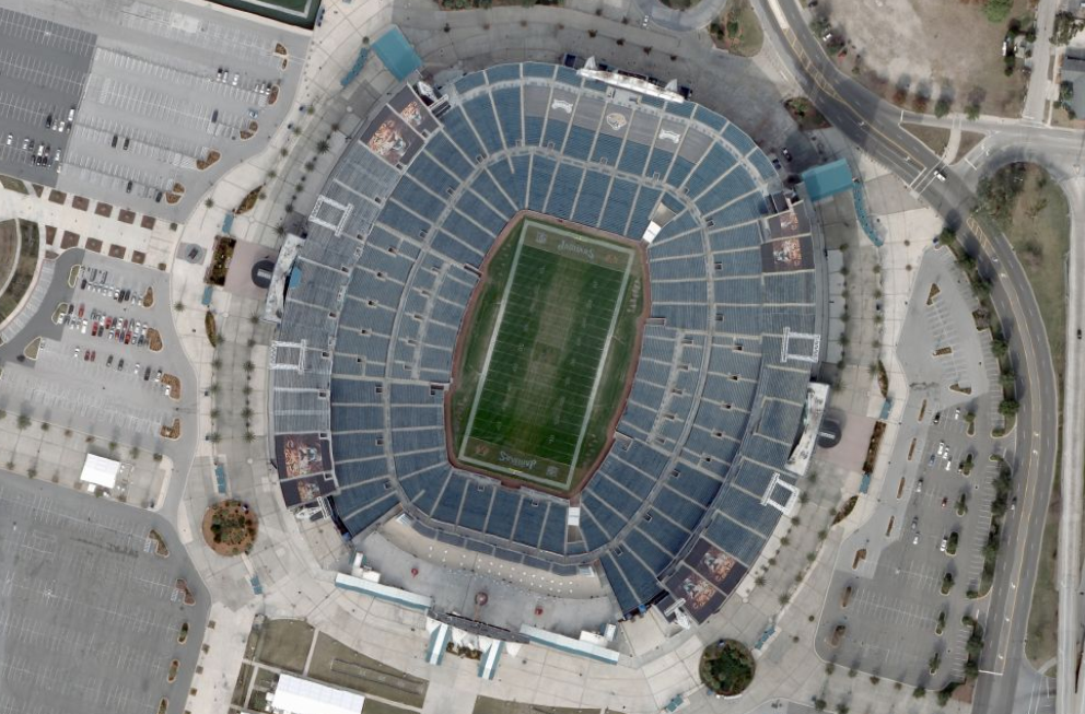 Image satellite du EverBank Field ou Alltel Stadium de Jacksonville (Floride) Image USGS prise sur Nasa World Wind